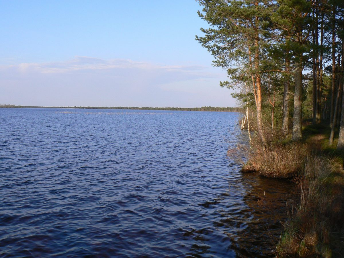 Tänavjärv